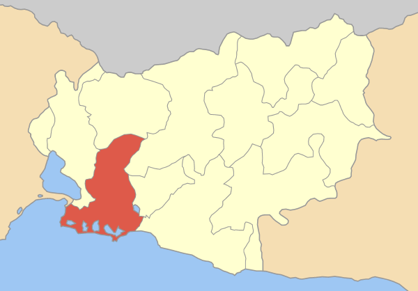 Locator map of Egiros municipality (Δήμος Αιγείρου) in Rodopi prefecture (Νομός Ροδόπης) in Greece.